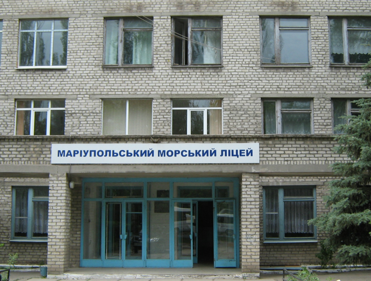 Маріупольський морський ліцей